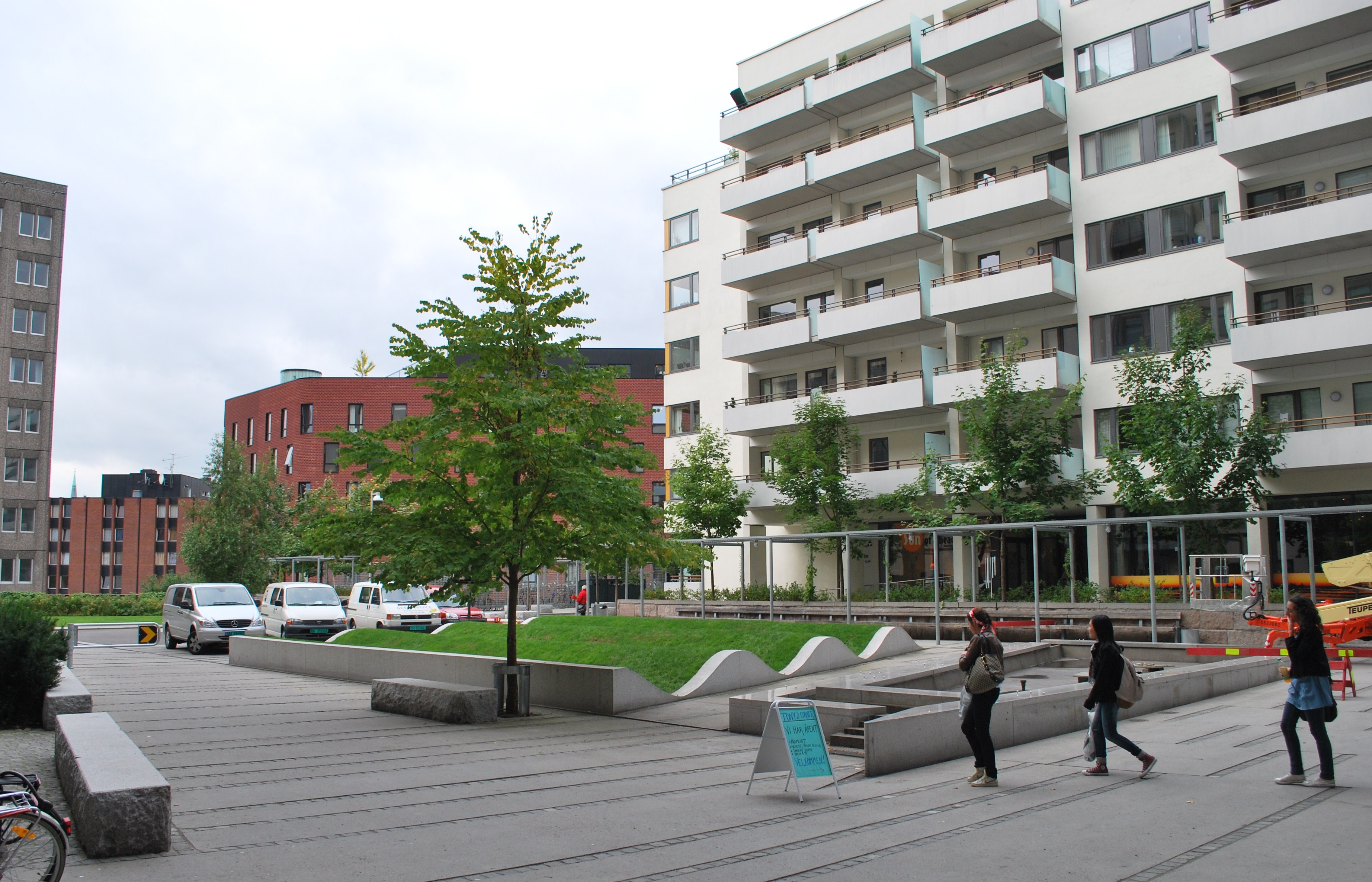 Hospitalplassen, Pilestredet park, Oslo.